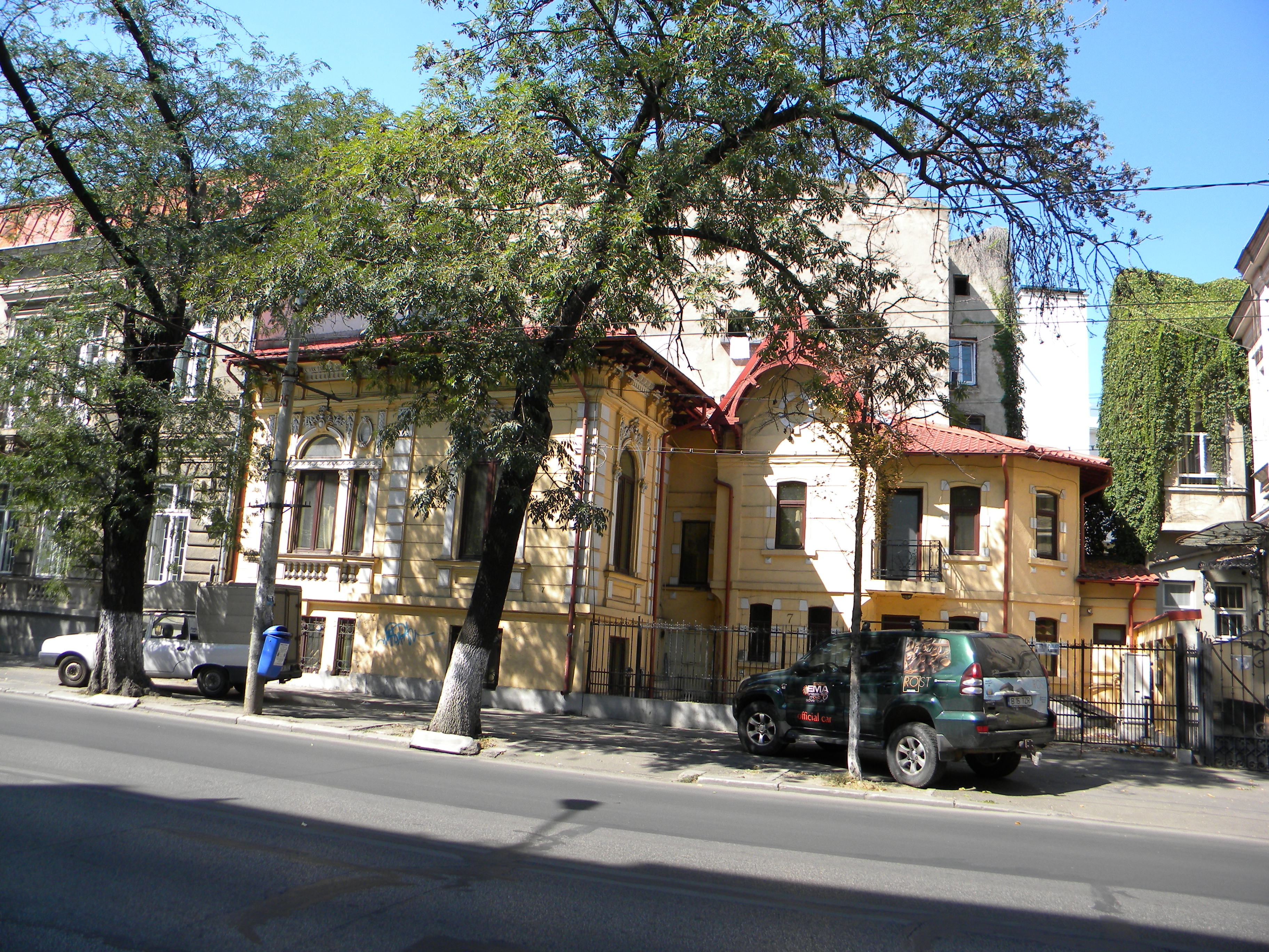 Imobil pe Bd. pache Protopopescu nr. 7, Bucuresti sect. 2